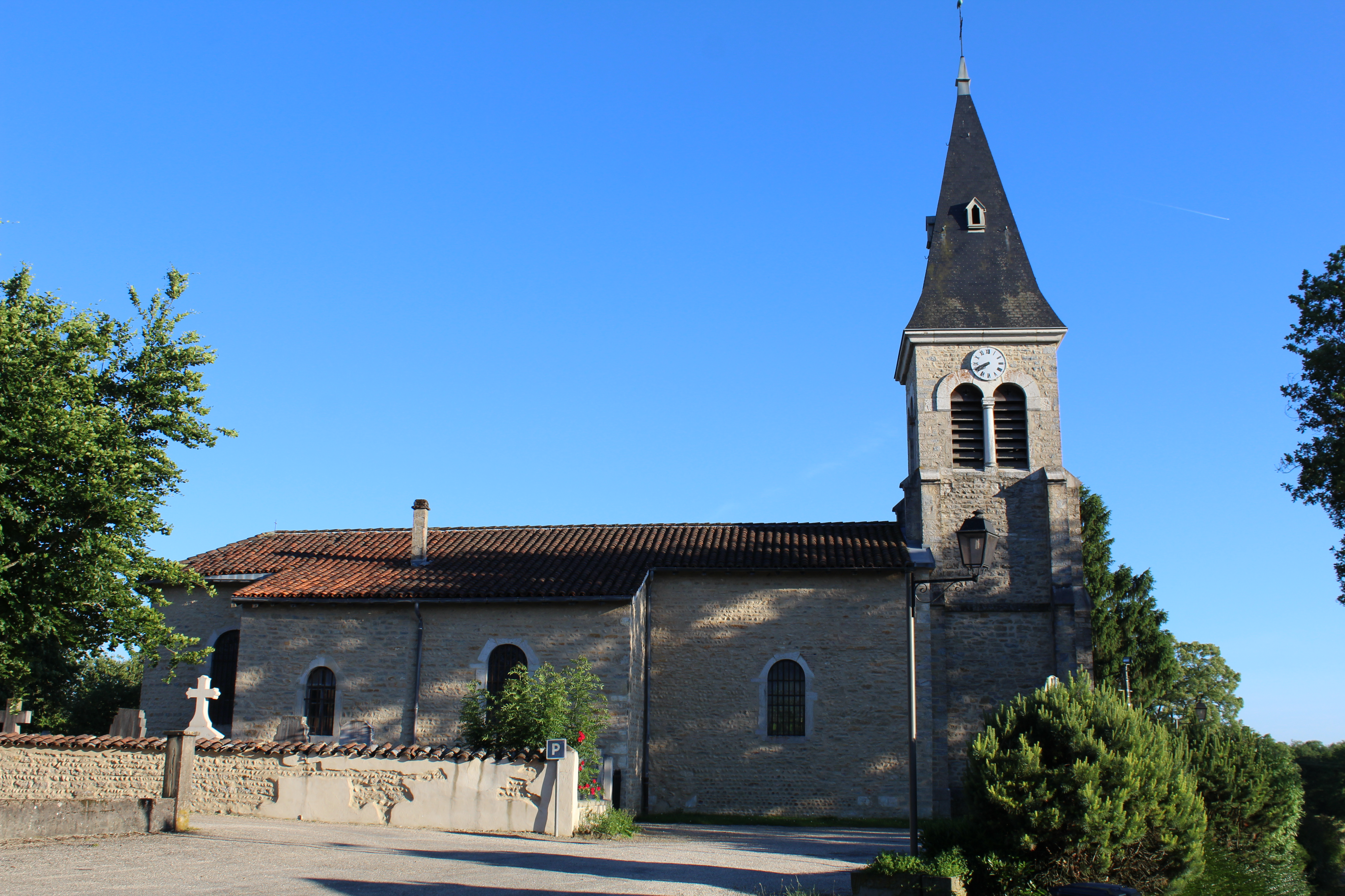 Église Saint-Bernard de Saint-Just, Ain.